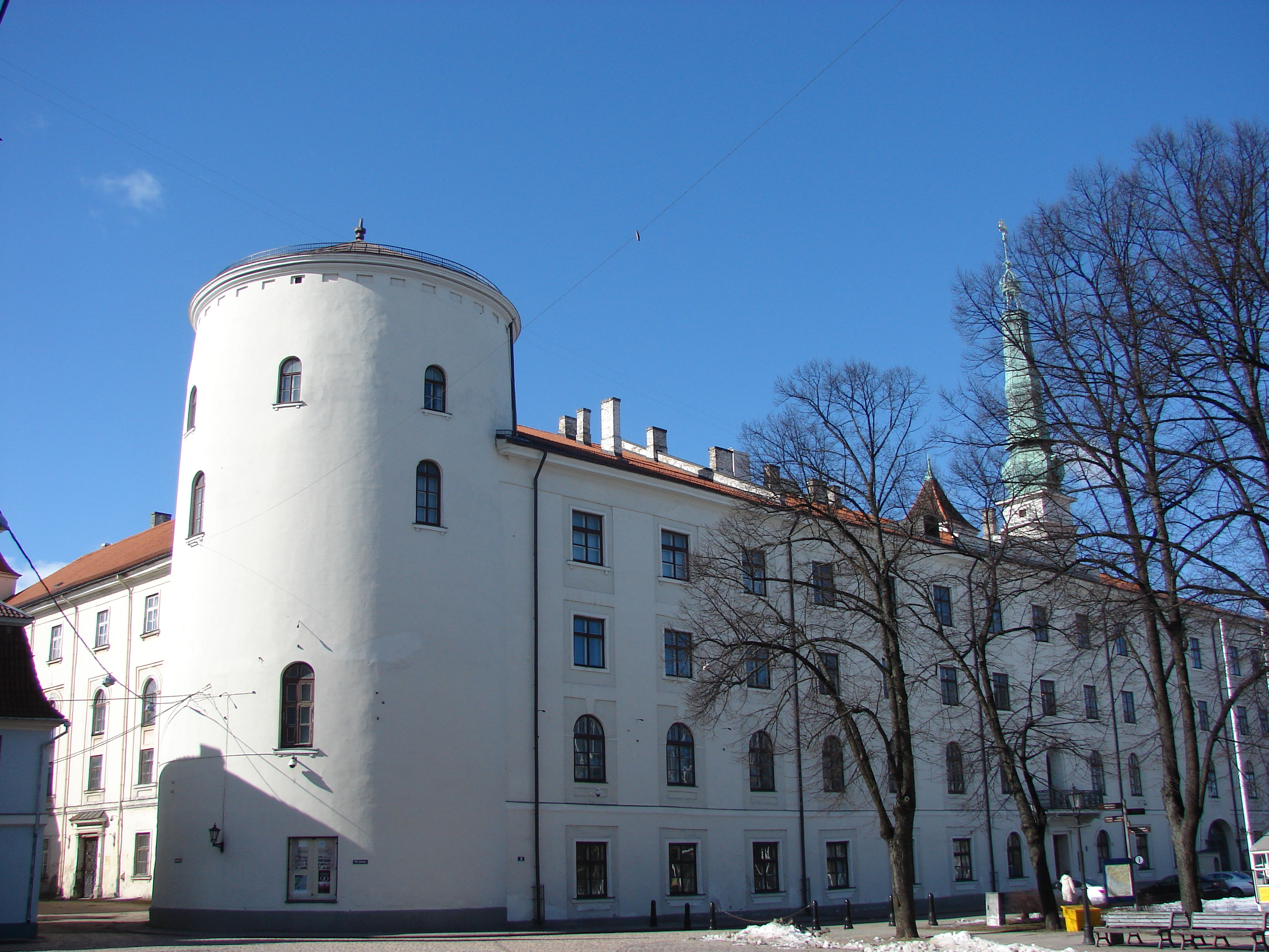 Rīgas pils, Pils laukums 3, Rīga, Latvia